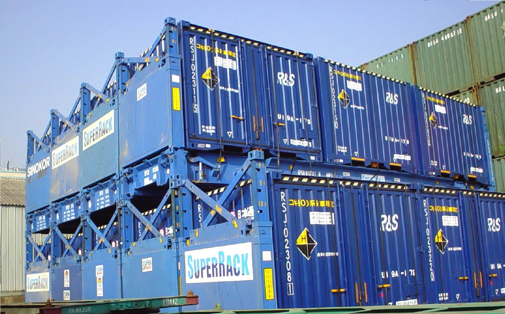 オーバーサイズ貨物の寸法に合わせて高さが調節できます